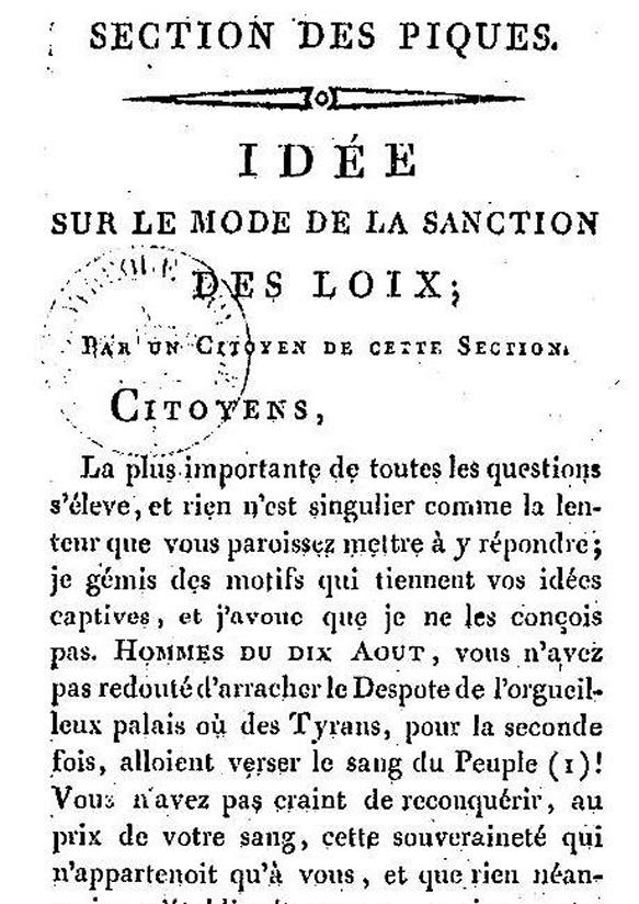 "Idées sur le mode de sanction des lois" rédigé par le citoyen Sade pour la Section des Piques.